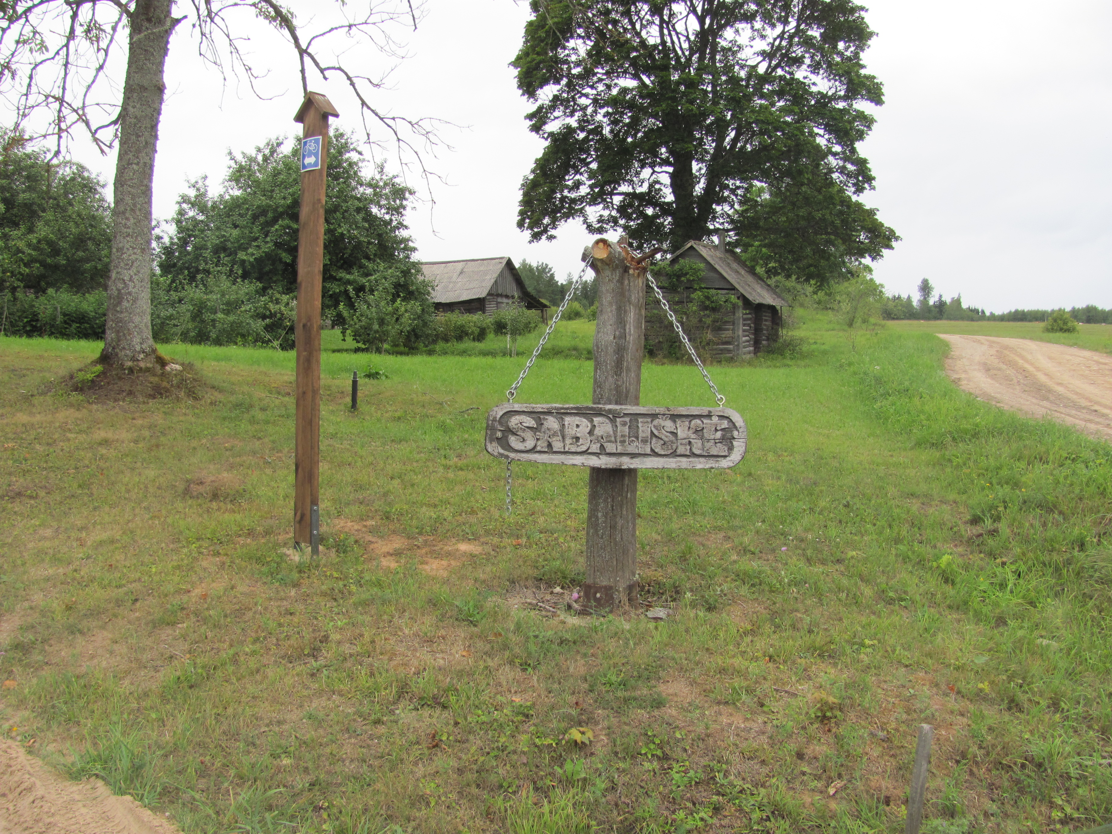 Kazitiškis, Lithuania